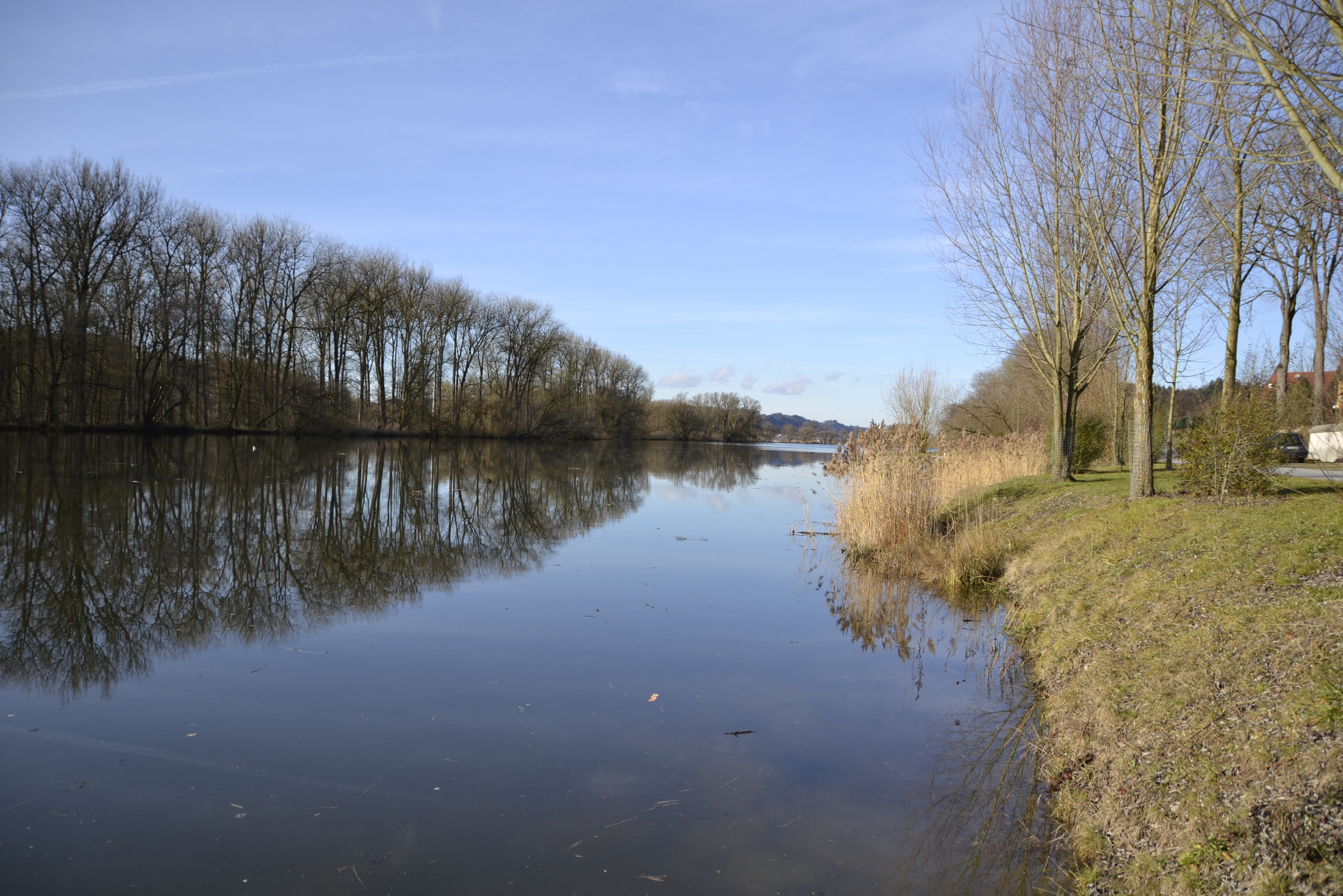 Altarm der Donau in Windorf.